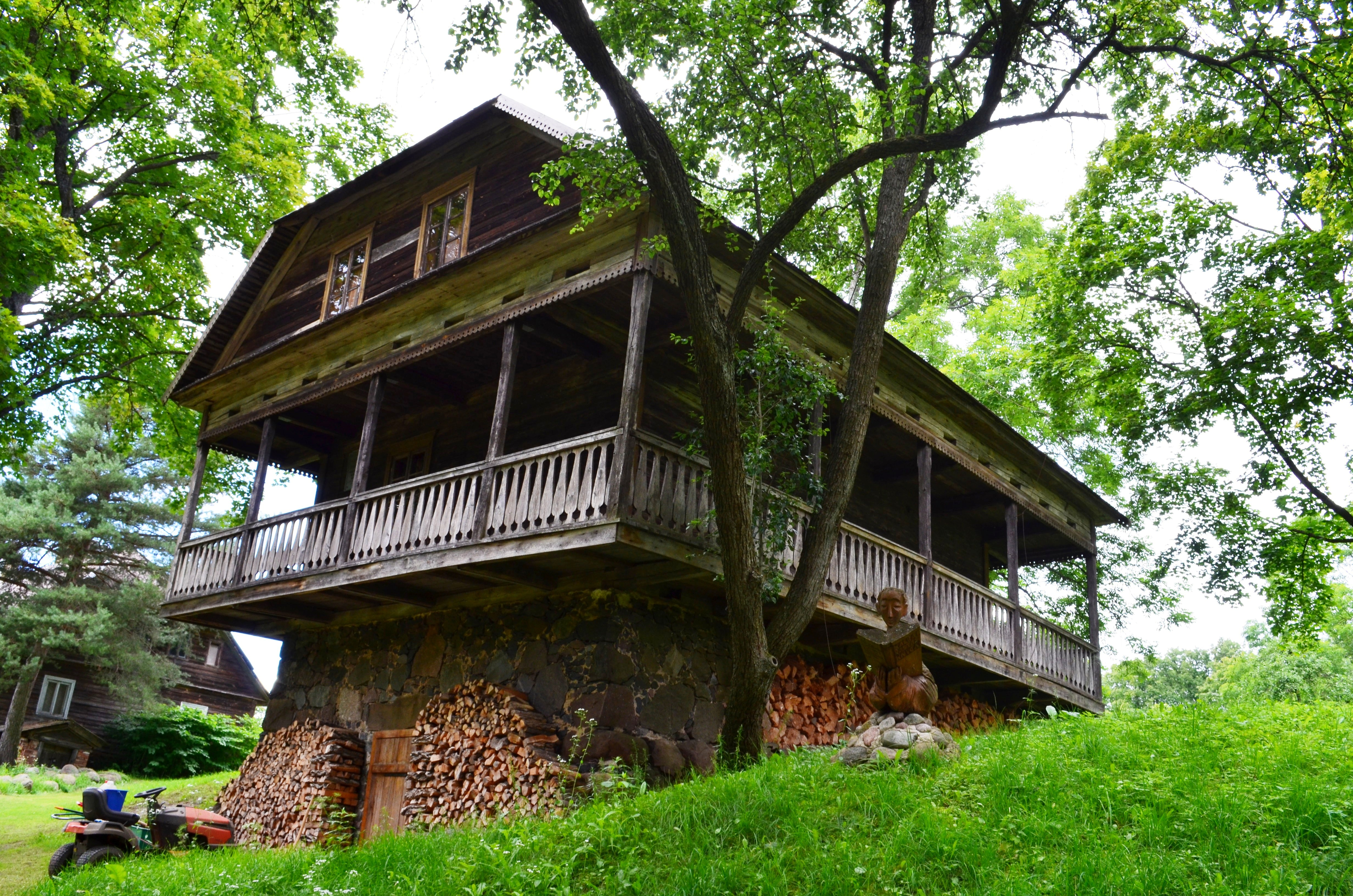 Knygnešių muziejus, Ustronė, Panevėžio raj.